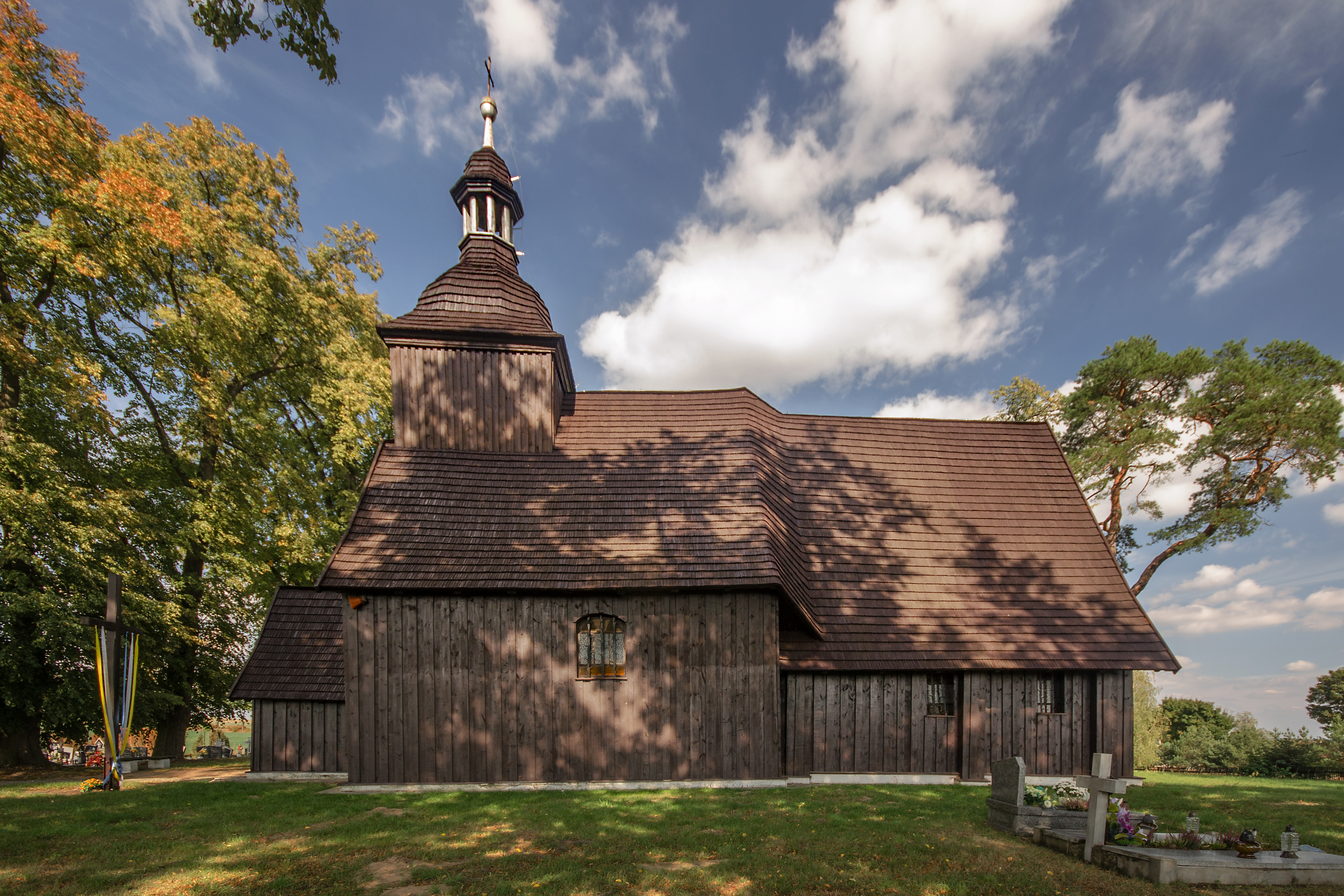 Miechowa, kościół ewangelicki, ob. rzym.-kat. fil. p.w. św. Jacka, 1628, 1753, 1911